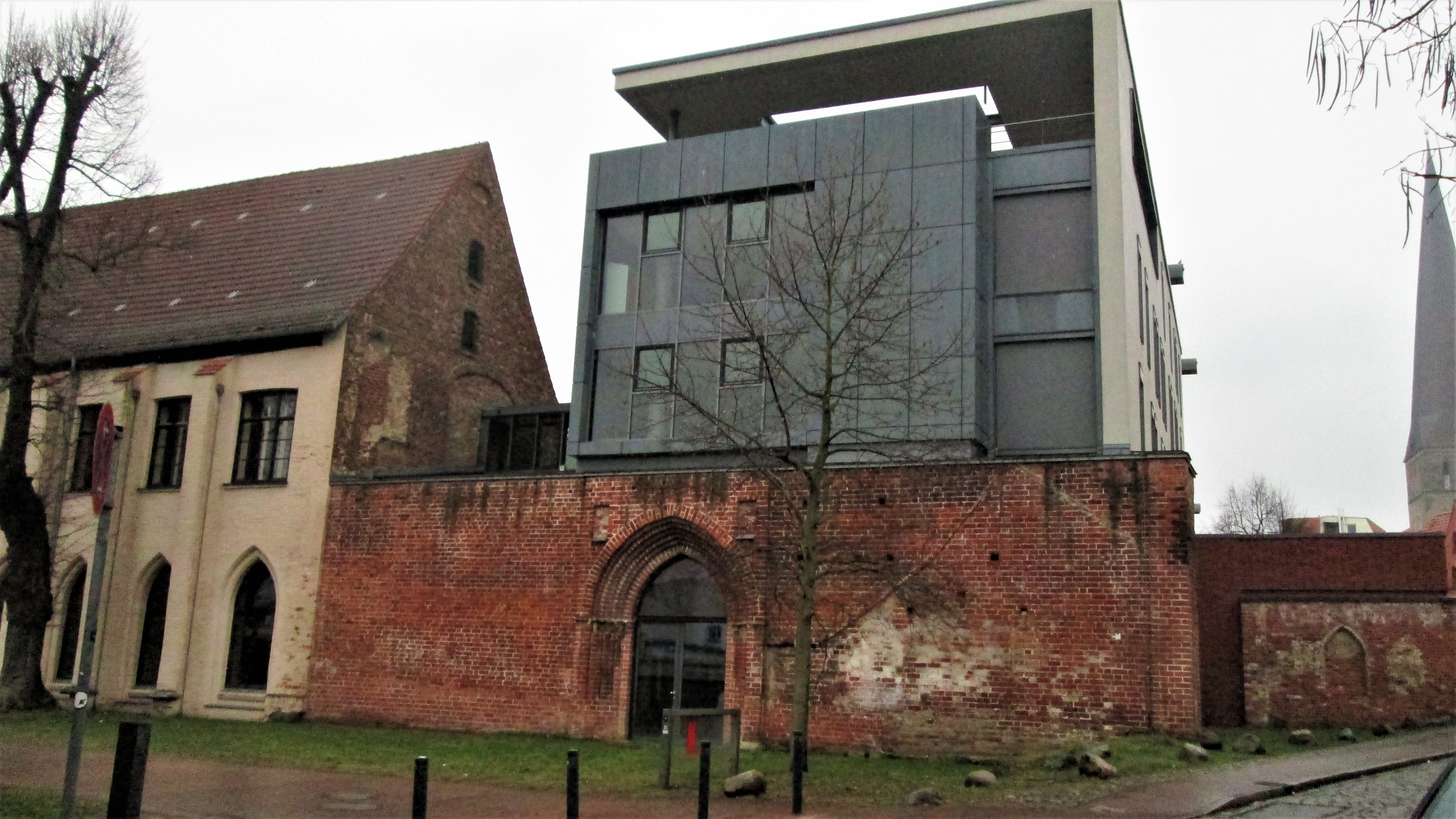 Hochschule für Musik und Theater Rostock - Blick von Westen mit dem Eingangsportal des Franziskanerklosters